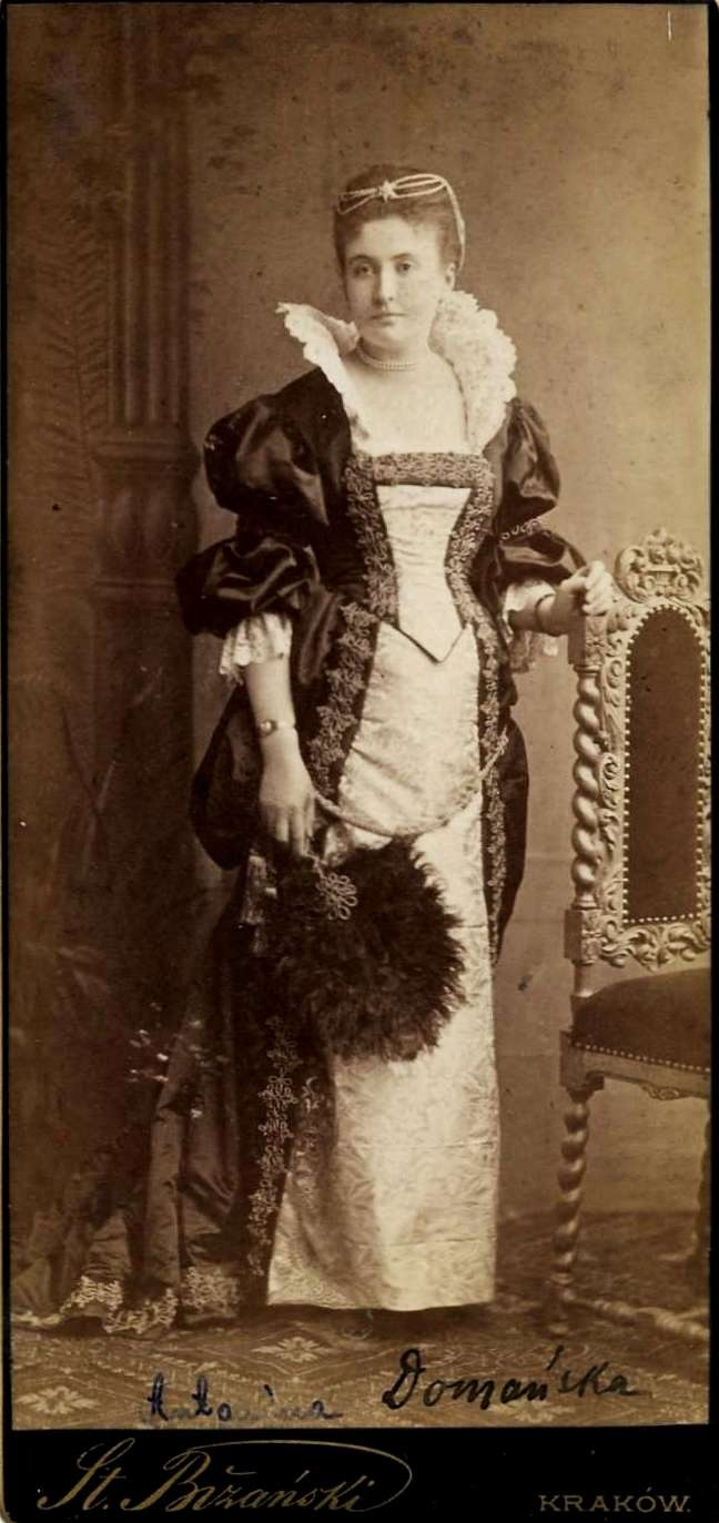 Antonina Domańska